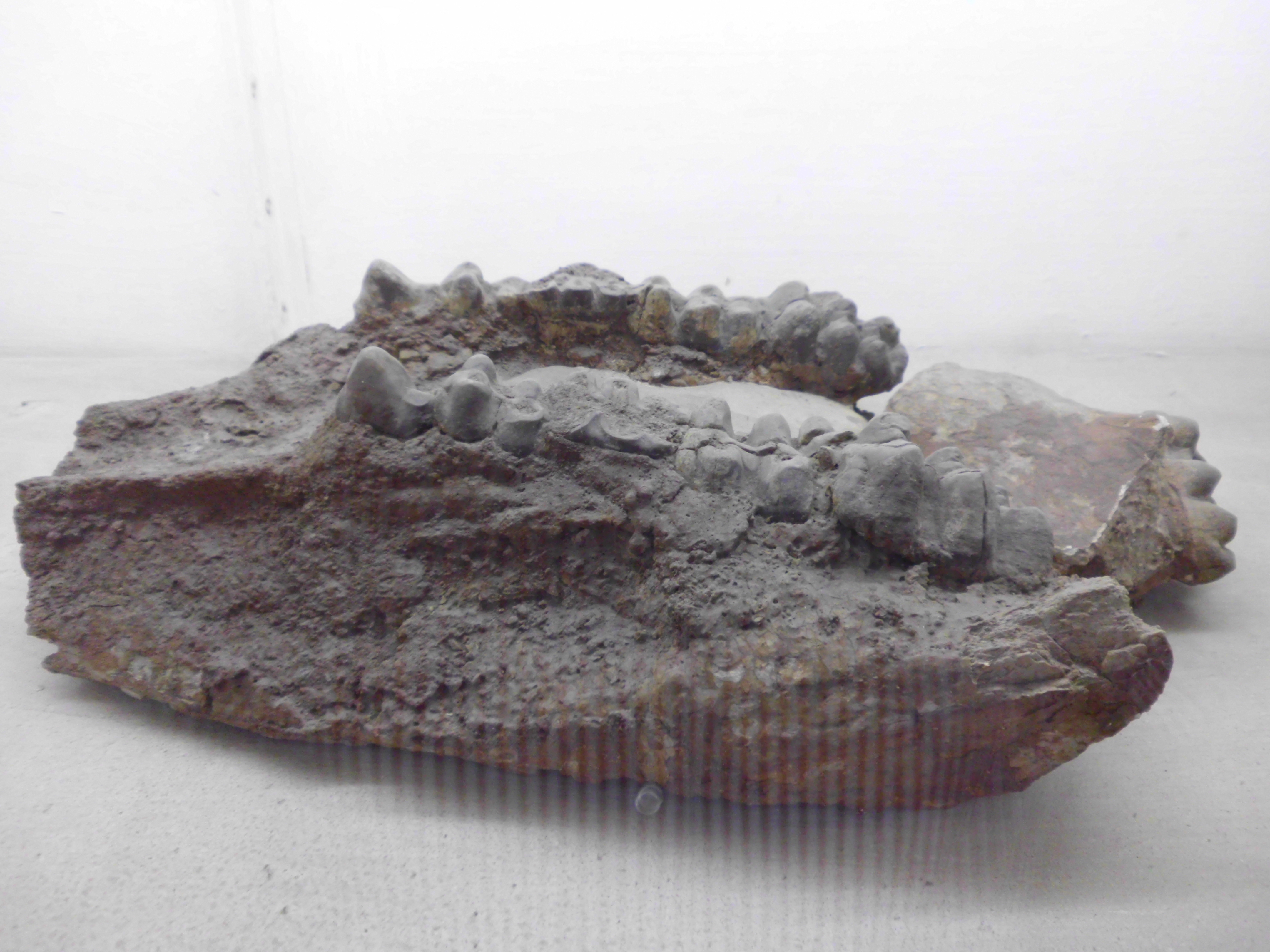 جزء من الفك السفلي باليوماستودون من عصر الاوليجوسين في شمال بركة قارون